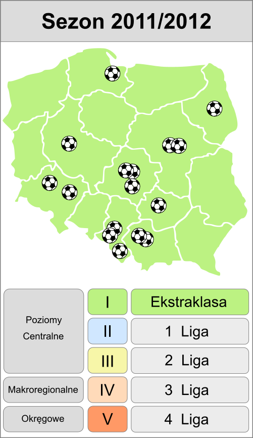 Jagiellonia w sezonie 2011/2012 - mapa